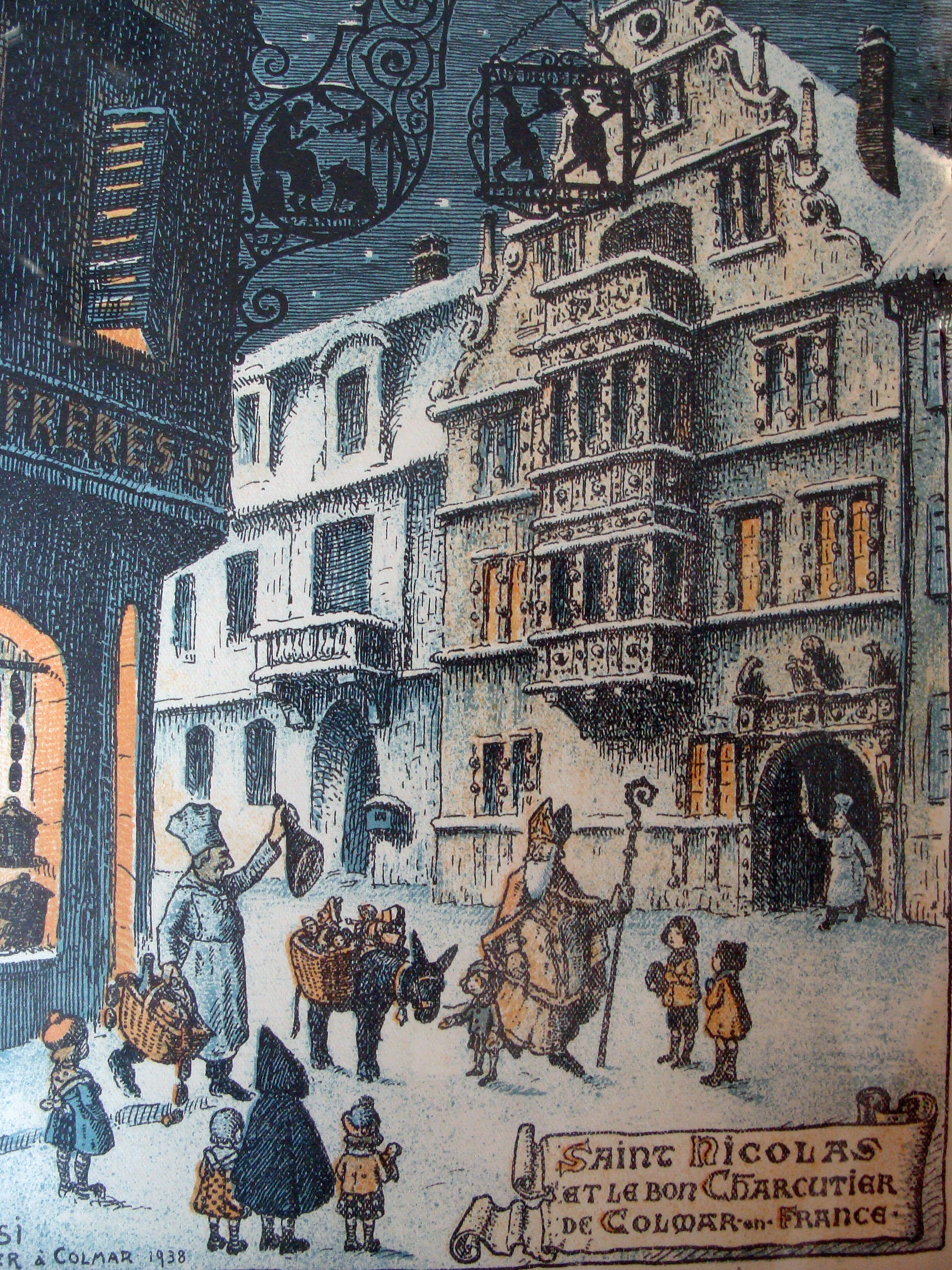 lithographie originale de Hansi (1938) représentant Saint-Nicolas passant devant la Maison des Têtes et la boucherie des frères Finker à Colmar (Alsace).